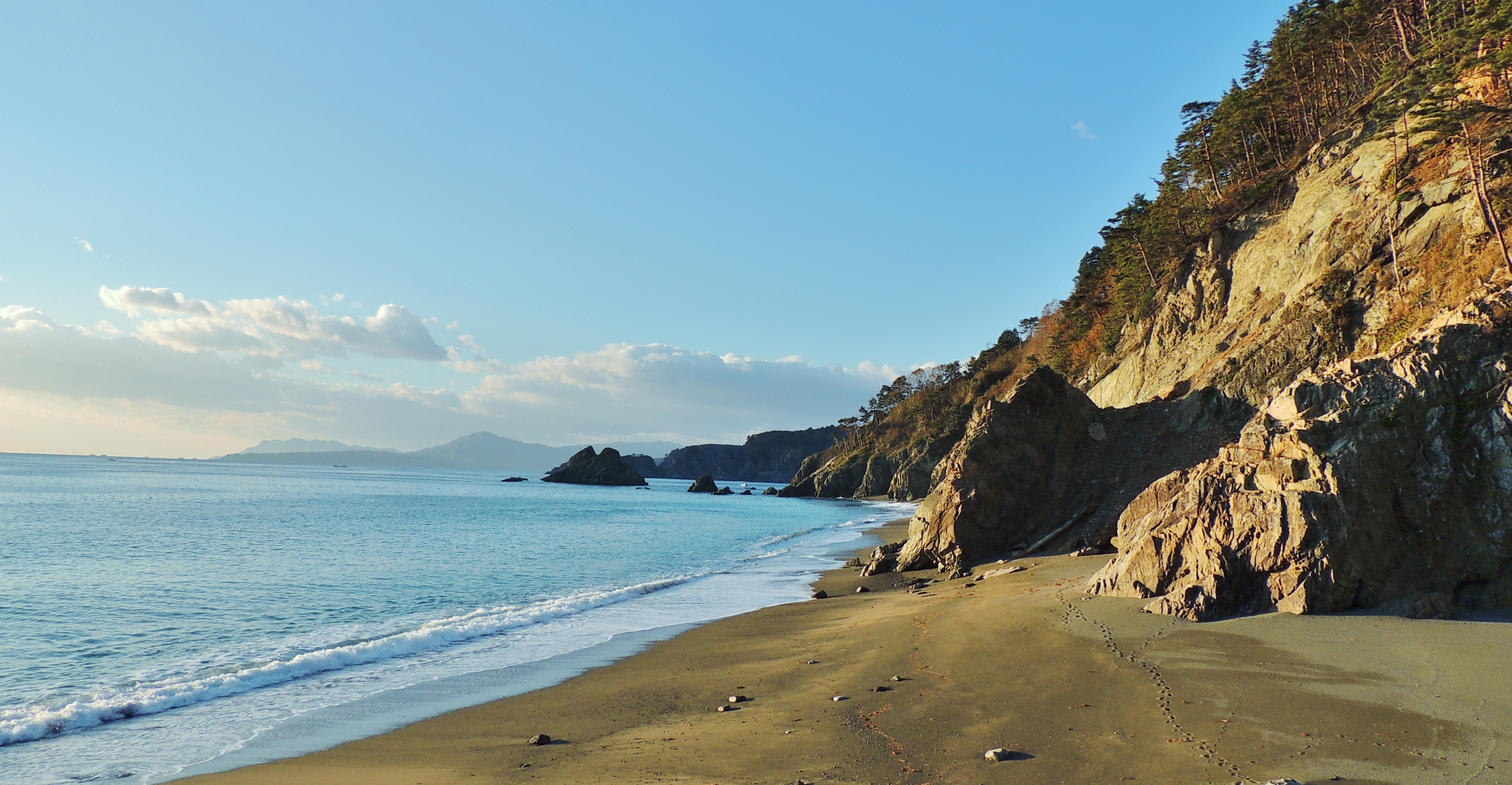 三陸 田老海岸